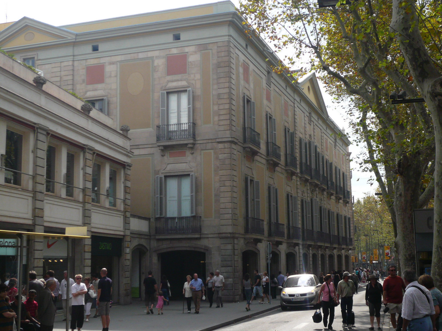 Palau Moja, vist de la Rambla